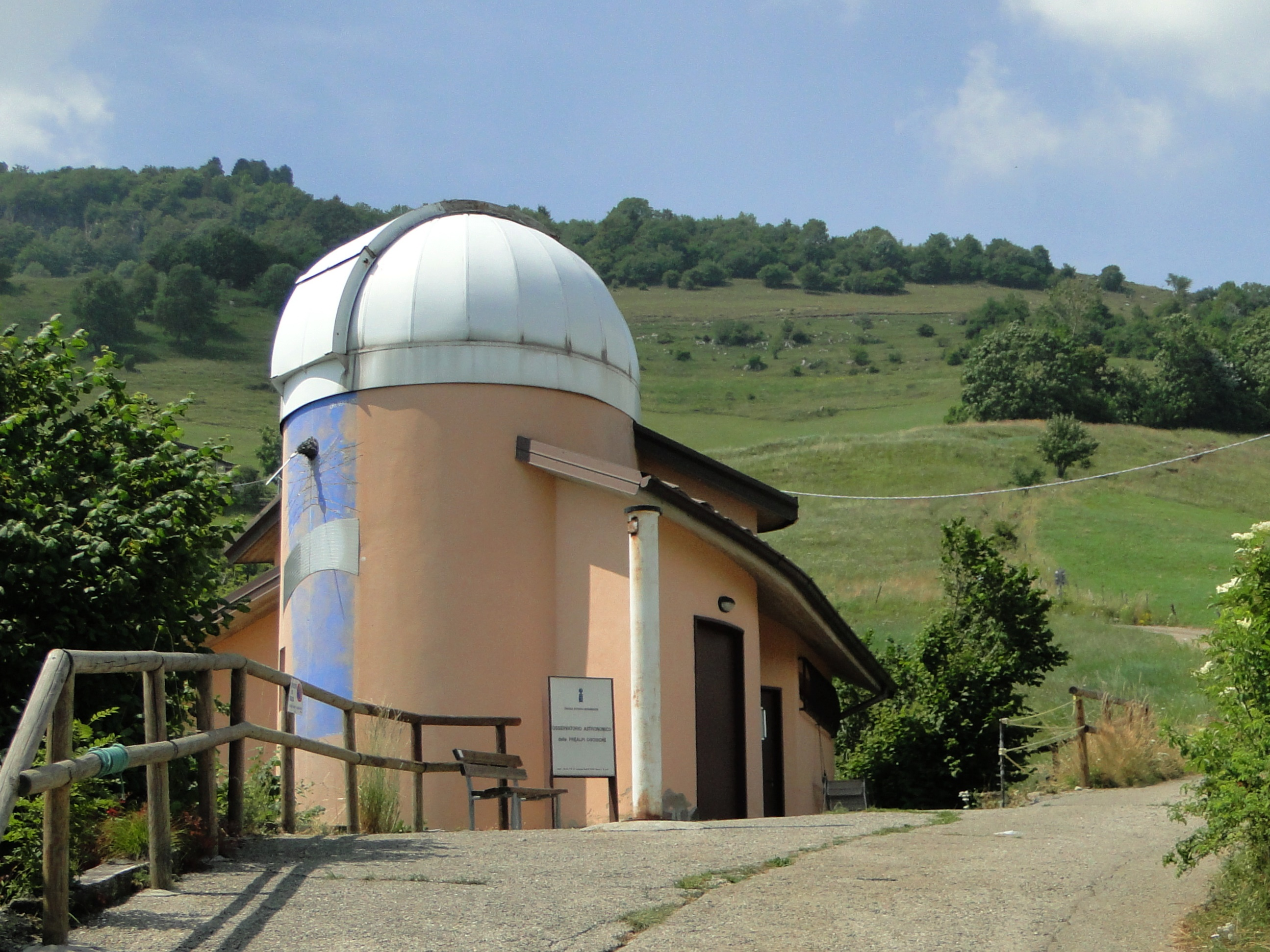 Ganda, fraz. di Aviatico (BG). Osservatorio astronomico